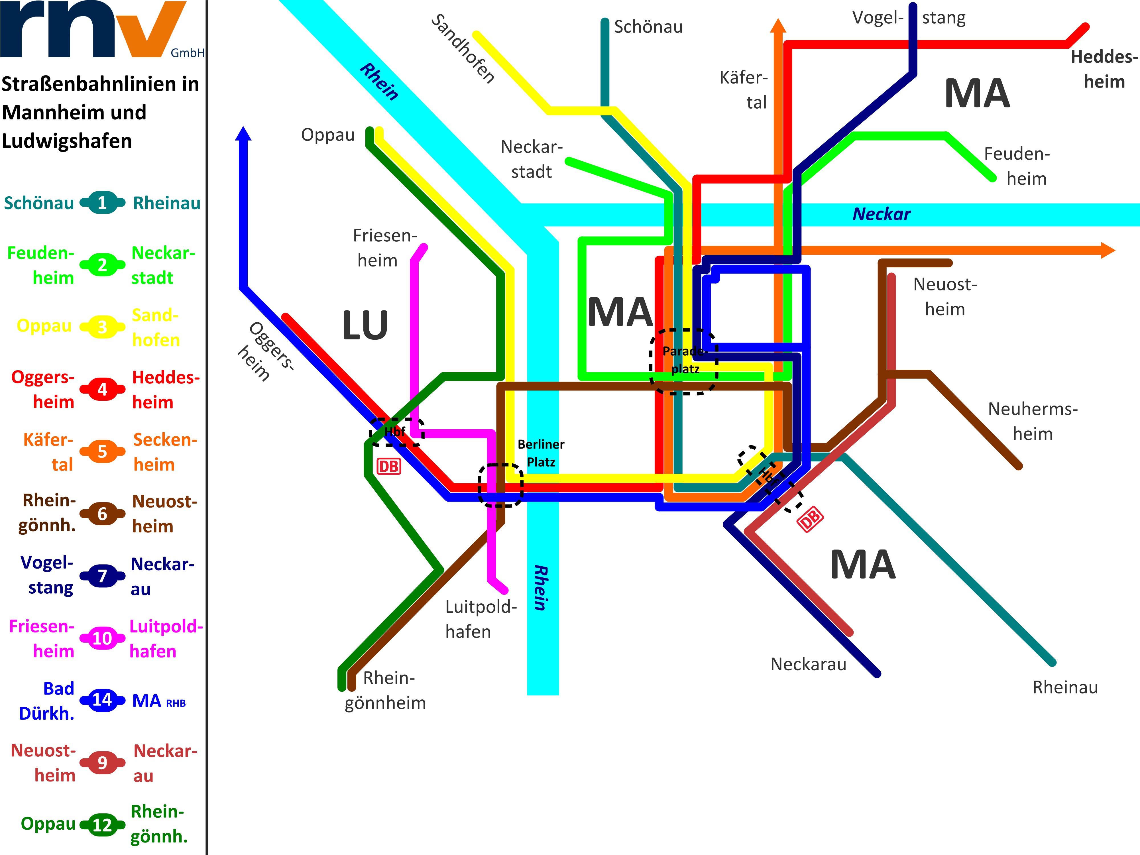 Schematische Karte der Straßenbahnlinien in Mannheim und Ludwigshafen am Rhein.